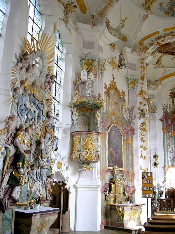 Votivkirche St. Thekla (Welden, Landkreis Augsburg, Bayerisch-Schwaben). Langhaus, Nordseite. Eigene Aufnahme, Sept. 2007 / St. Thekla (Welden near Augsburg, Bavaria, Germany). Northern side of the nave. Own photo, Sept. 2007